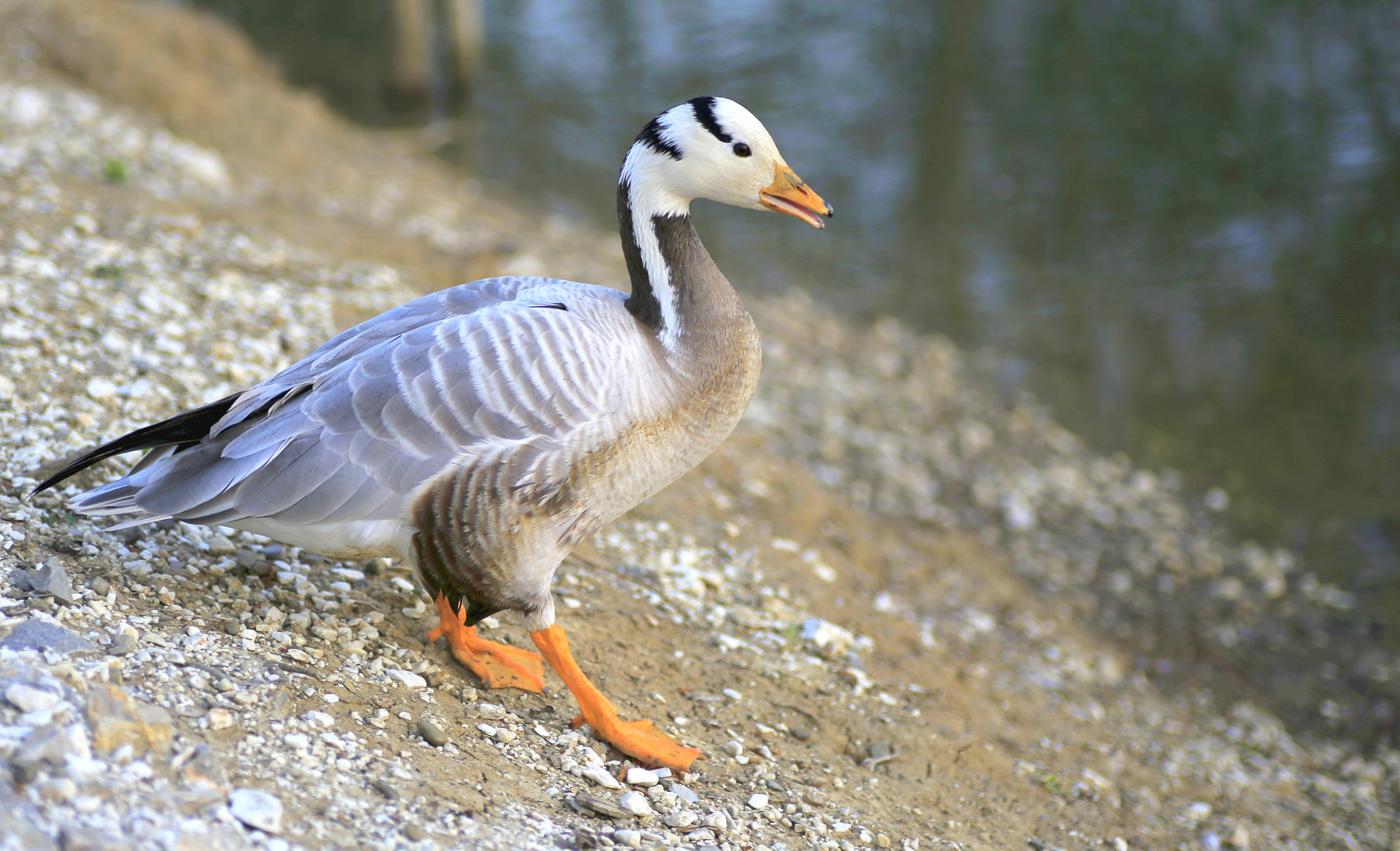 anatra